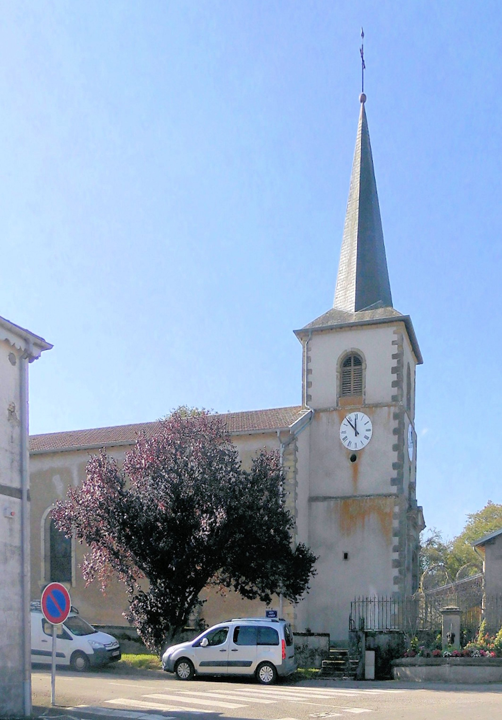 L'église Saint-Maur de Bouxurulles